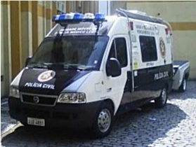 Furgão da Polícia Técnica (Mobile forensic unit) - Rio de Janeiro - Brazil.